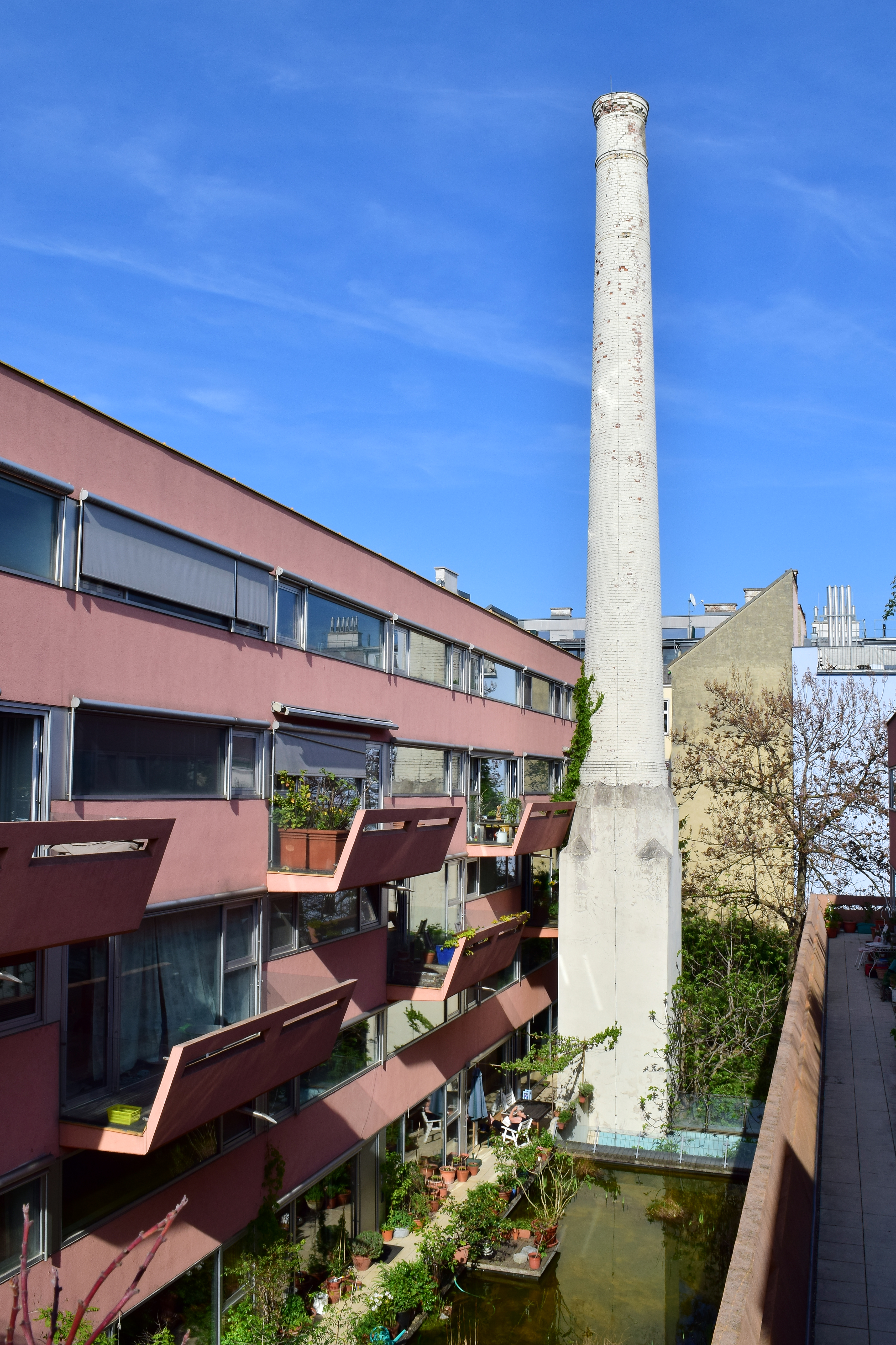 Der Schornstein der ehemaligen Sargfabrik in Wien-Penzing, in welcher der Verein für Integrative Lebensgestaltung im Jahr 1996 ein Wohn- und Kulturprojekt verwirklicht hat. Darin befinden sich neben Wohnungen auch ein Kulturhaus, ein Badehaus, ein Seminarraum, ein Kinderhaus und ein Café-Restaurant. Näheres in diesem PDF.